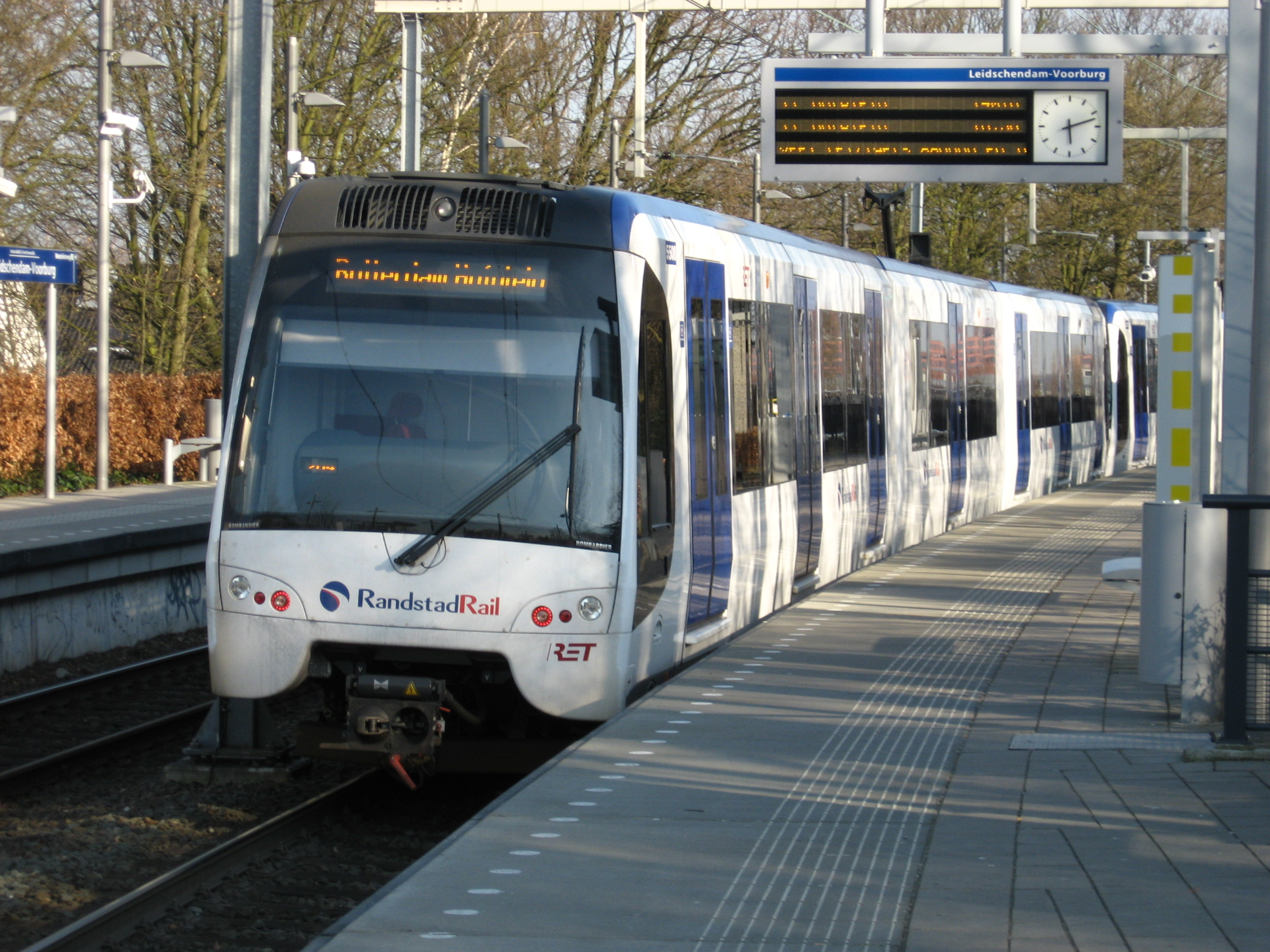 De Leidschendam Voorburg halte in 2009 met halterende Rotterdamse metro